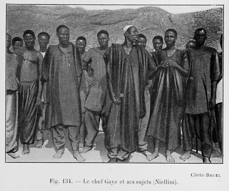 Le chef Gaye et ses sujets (Niellim). From L'Afrique Équatoriale Française: le pays, les habitants, la colonisation, les pouvoirs publics. Préf. de M. Merlin. Avec 186 reproductions photographiques, 33 diagrammes, profils, et 7 cartes dont 5 en couleurs, (published 1918).